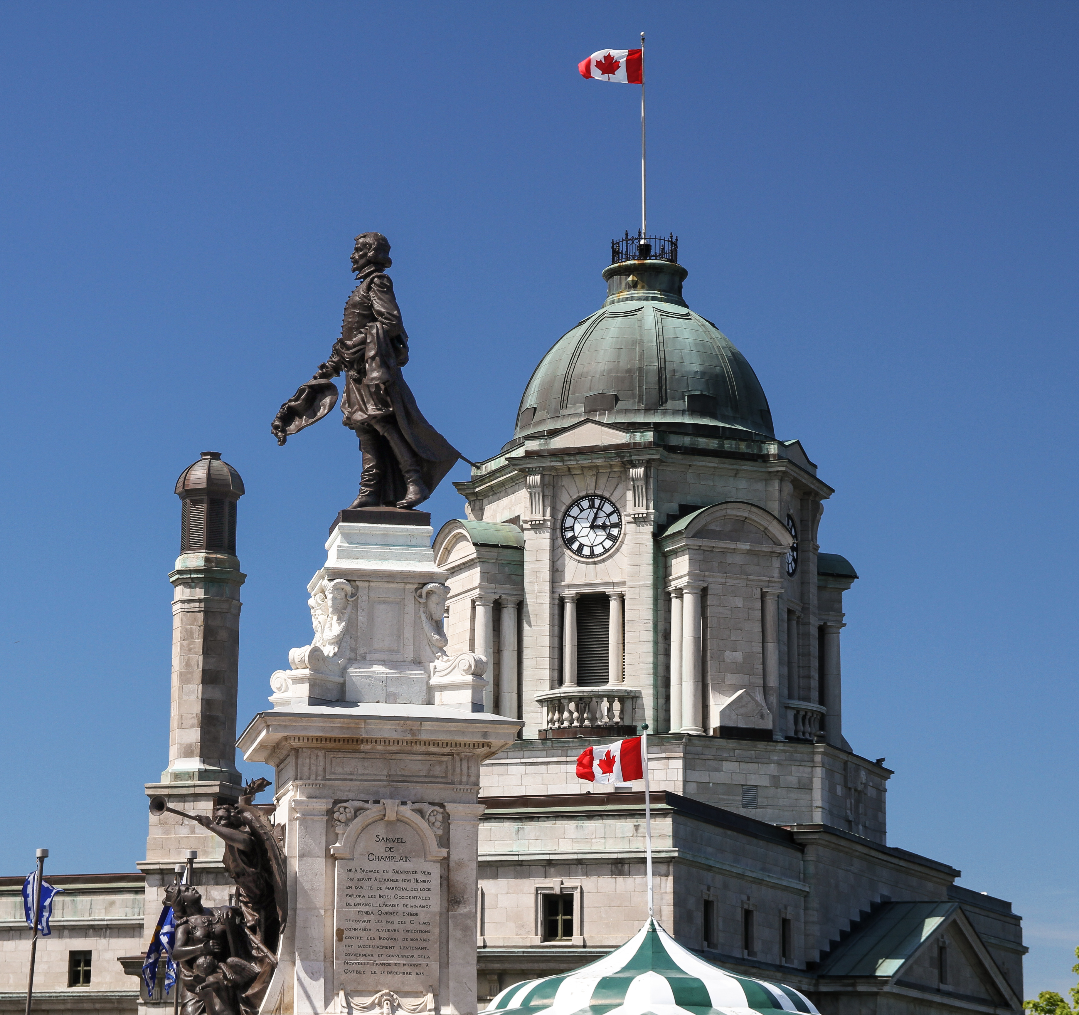 Édifice Louis S. St-Laurent (ancien bureau de poste), et statue de Samuel-De Champlain, Québec